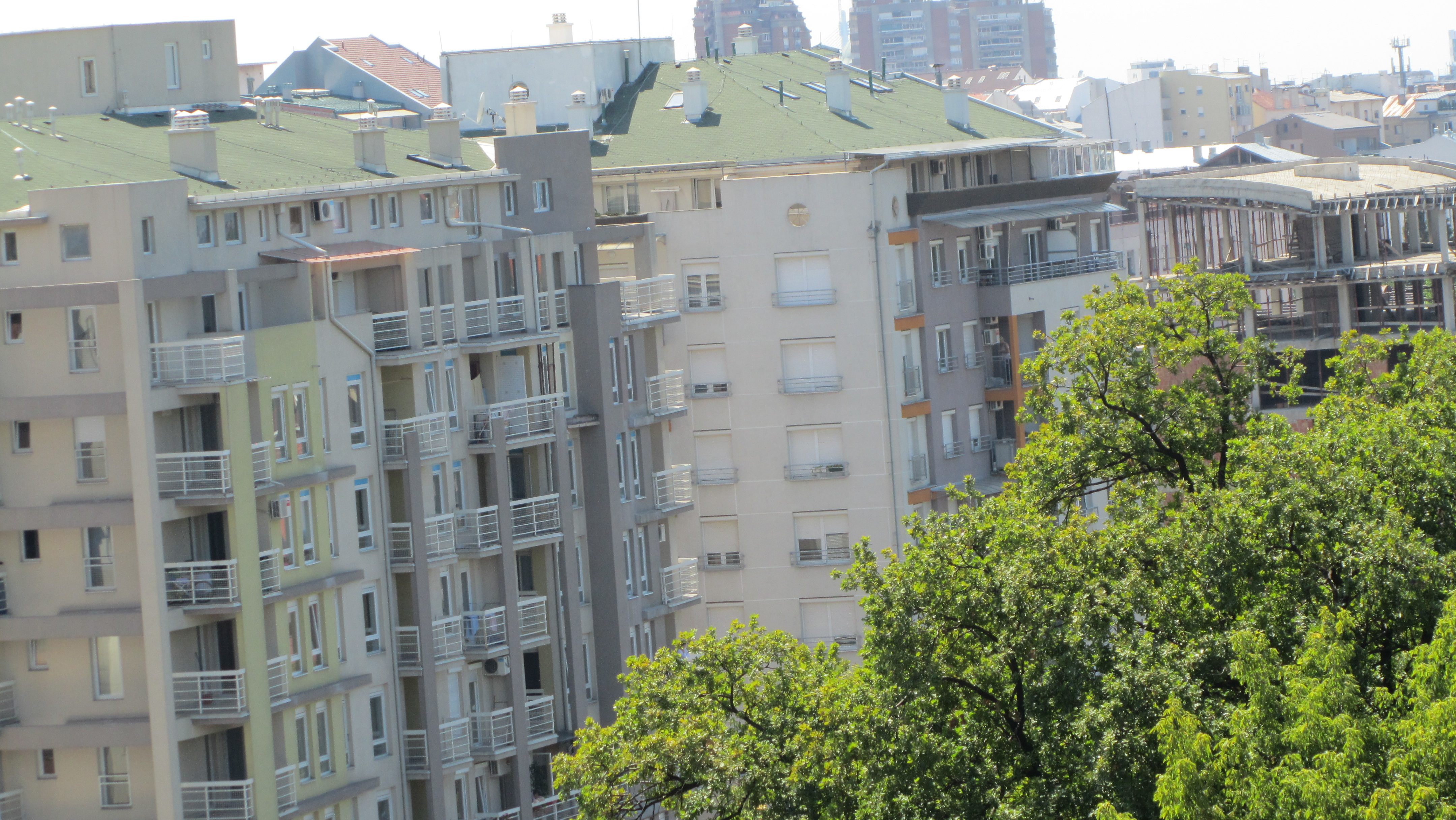 ul.dimitrija tucovića